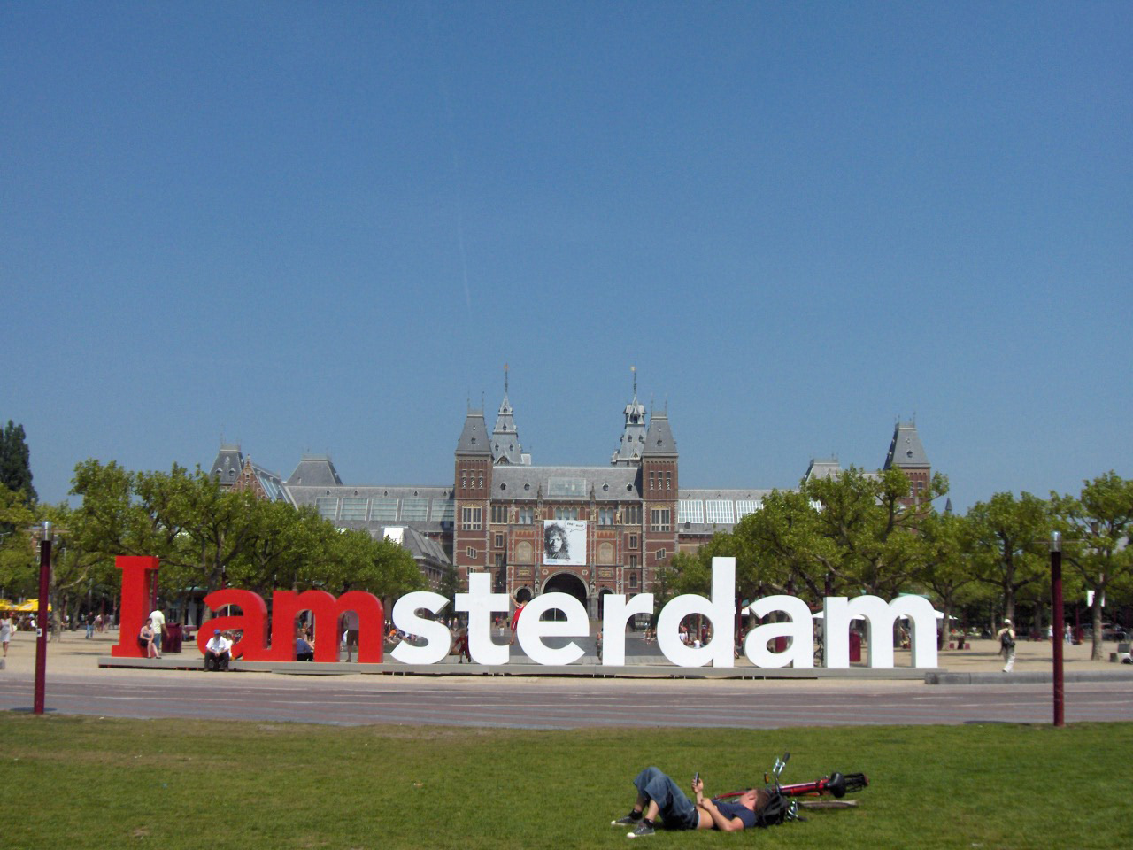 Rijksmuseum, Amsterdam